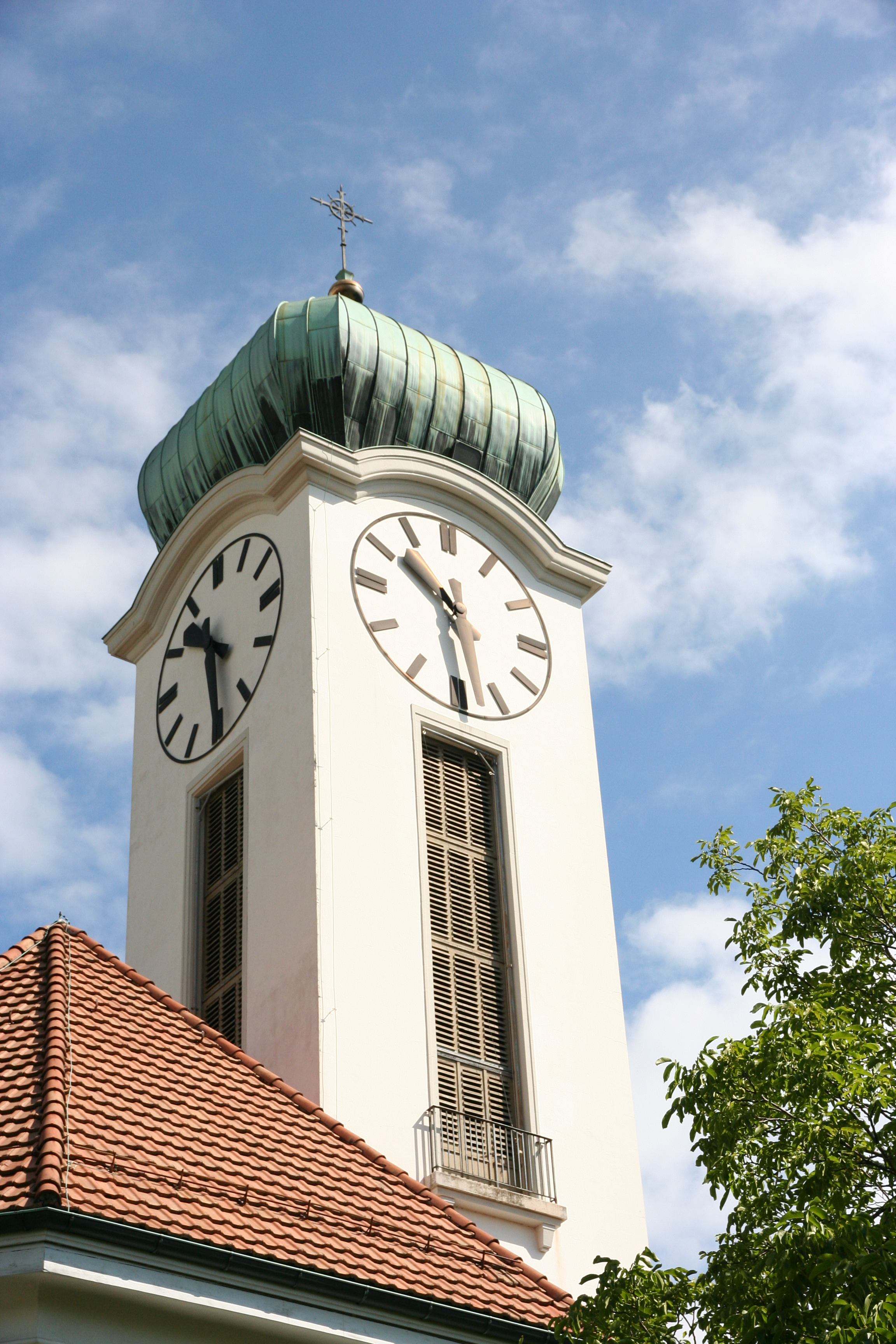 Römisch-katholische Pfarrkirche St. Felix und Regula Thalwil, Glockenturm